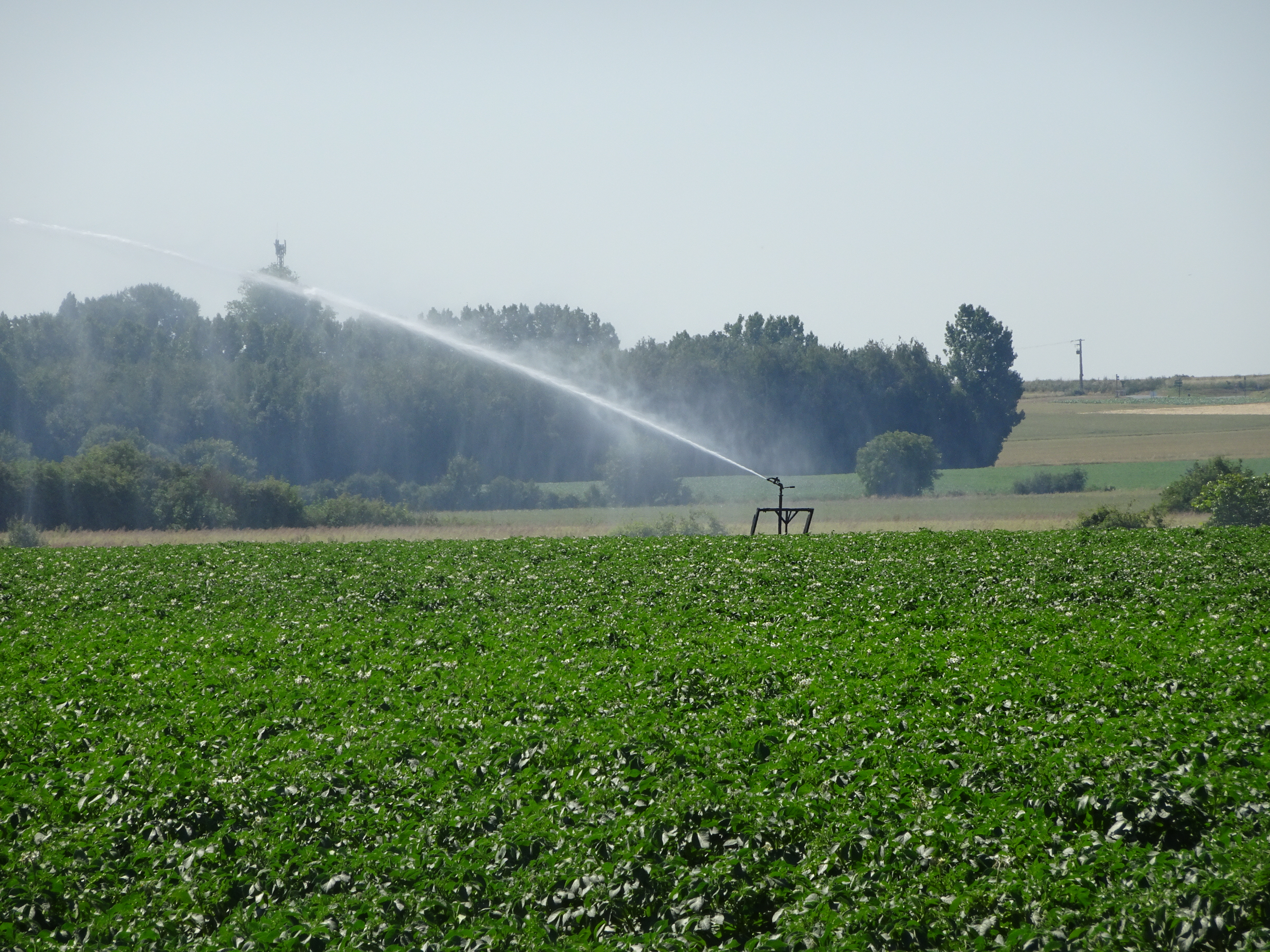 Norrent-Fontes culture du cresson (plante) Pas-de-Calais France